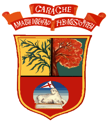 Escudo del municipio Carache, estado Trujillo, Venezuela